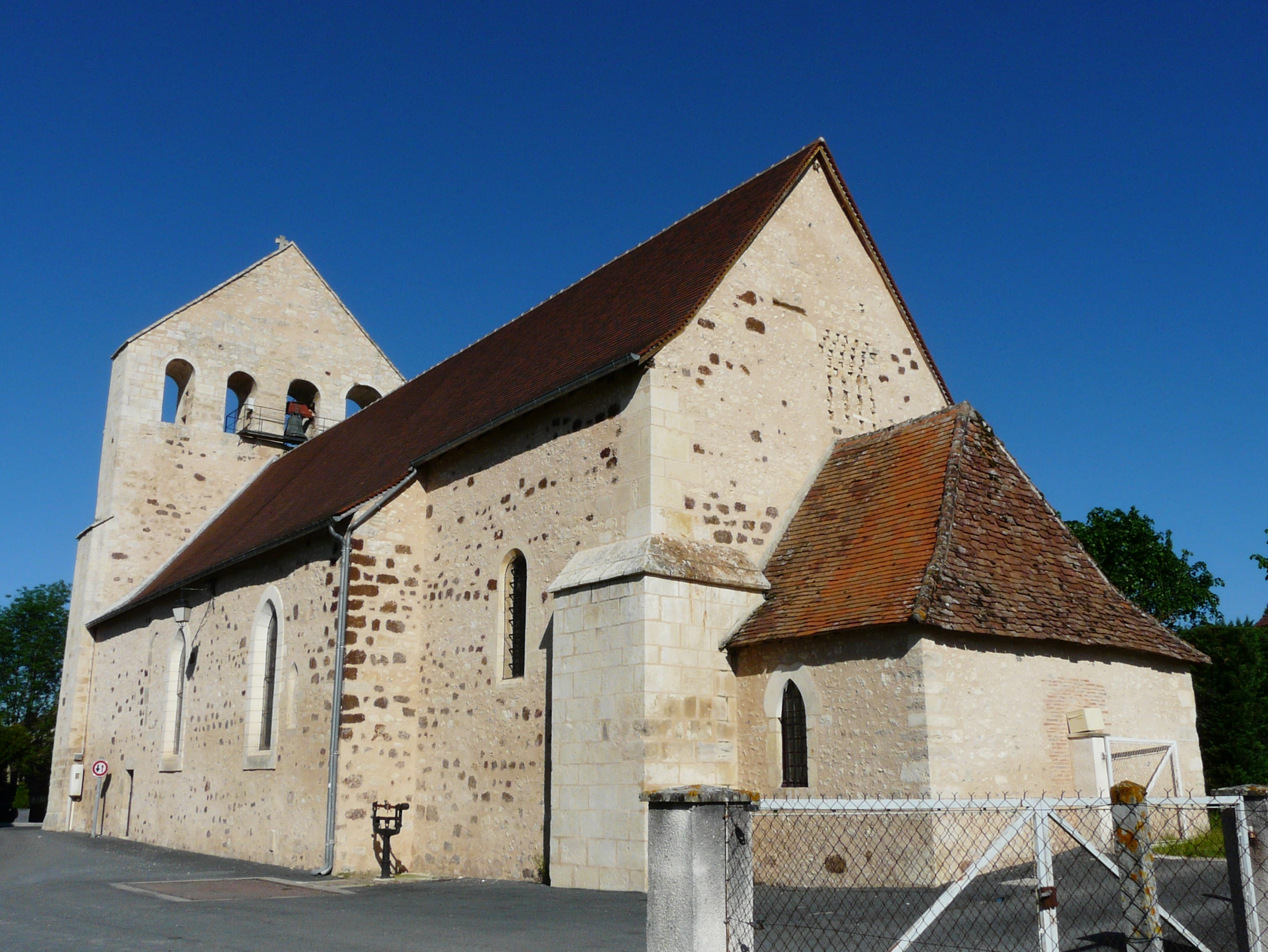 L'église Saint-Astier vue depuis le sud-est, Fossemagne, Dordogne, France.